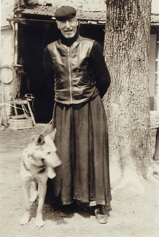 Don Luigi Mazzarello